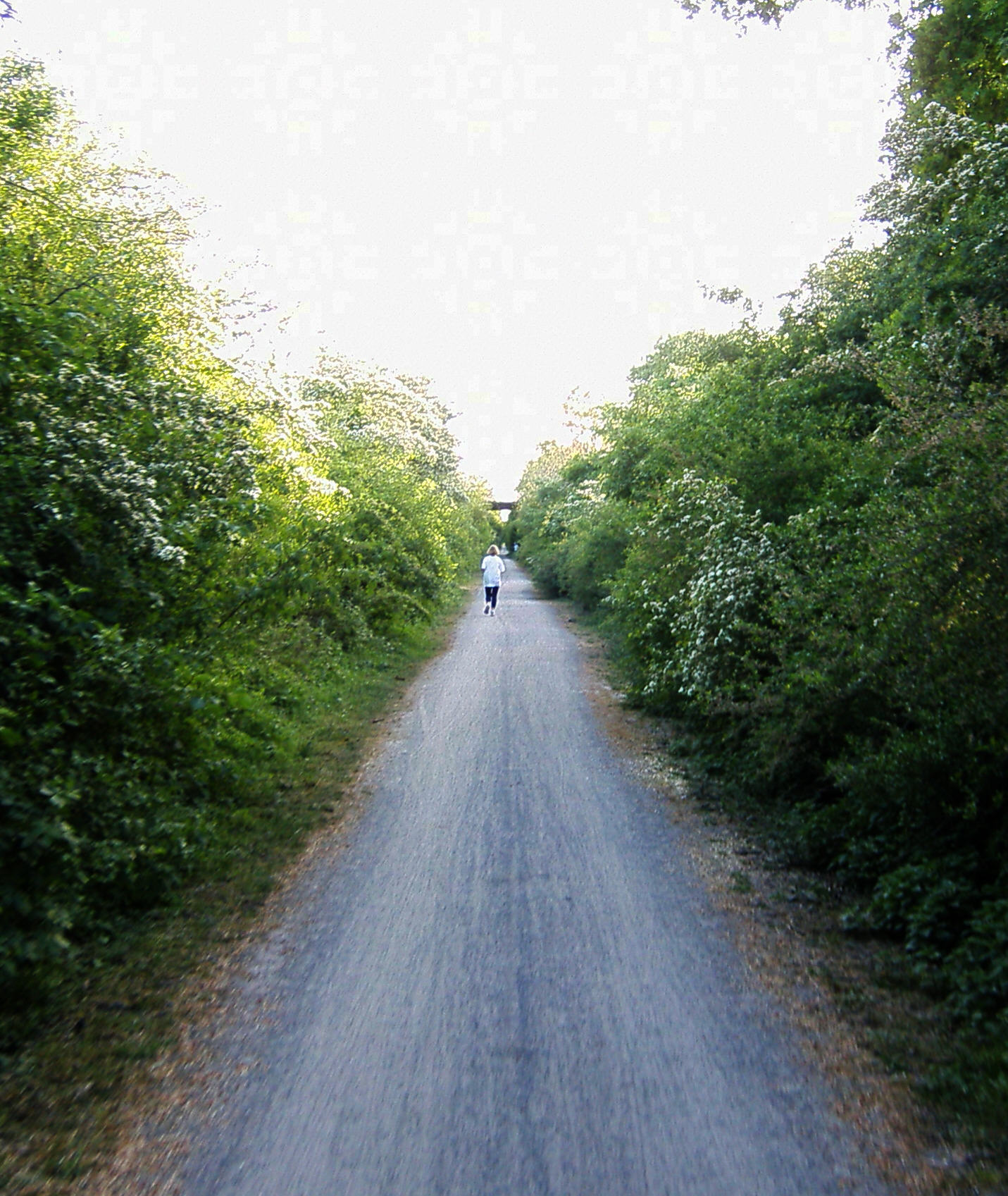 Bahnschacht am Thieberg, etwa 1 km vor dem Bahnhof Neuenkirchen. Ehemalige Bahnstrecke Rheine - Ochtrup in Neuenkirchen (Kreis Steinfurt), nordöstlich vom Bahnhof, Blickrichtung: Südwesten